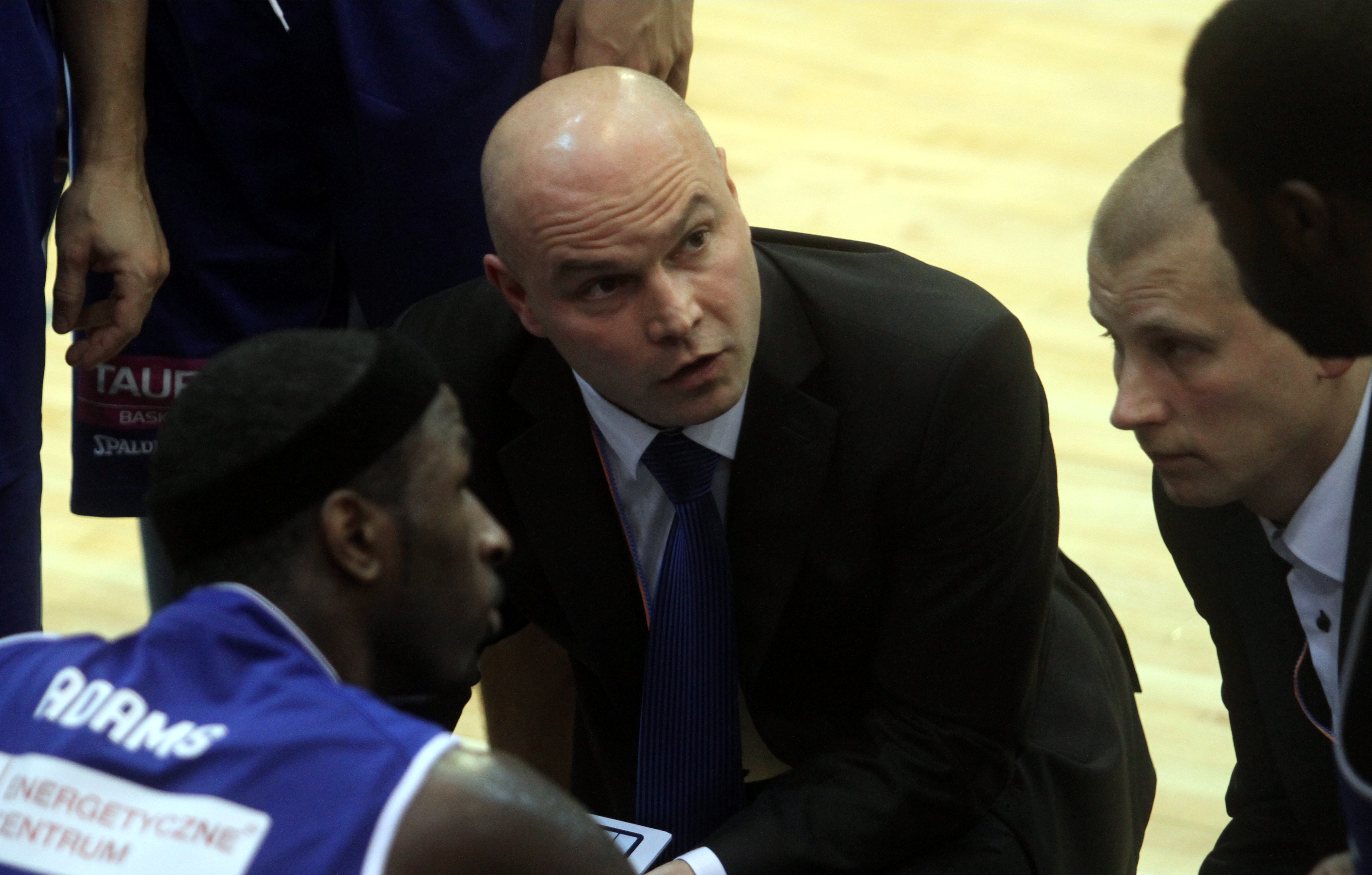 Wojciech Kamiński, trener Rosa Radom